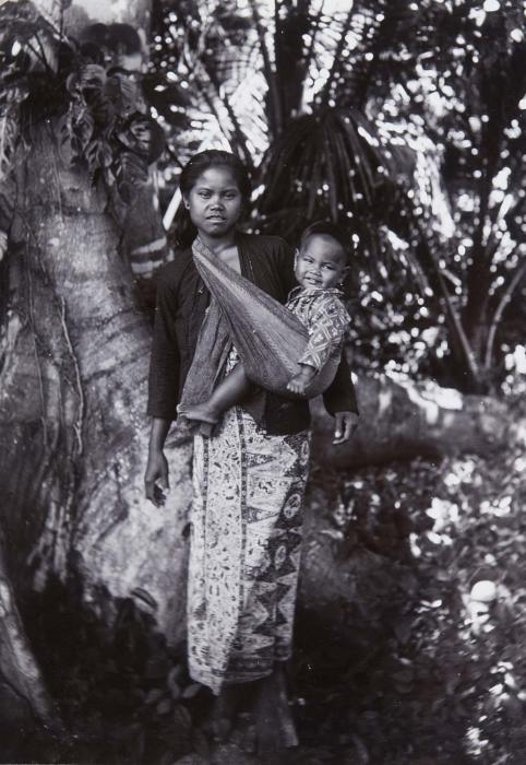 Foto. Portret van een Javaanse vrouw met een kind in een slendang